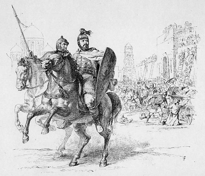 Великий Кнзь Мстислав Изяславич. 1167-1169 г.При захвате и разгроме Матери русских городов Андреем Боголюбским питавшем личную влажду к Мстиславу, последний был вынужден оставить княжение, и Киев навсегда утратил свое значение столицы Руси, уступив место Владимиру на Клязьме.